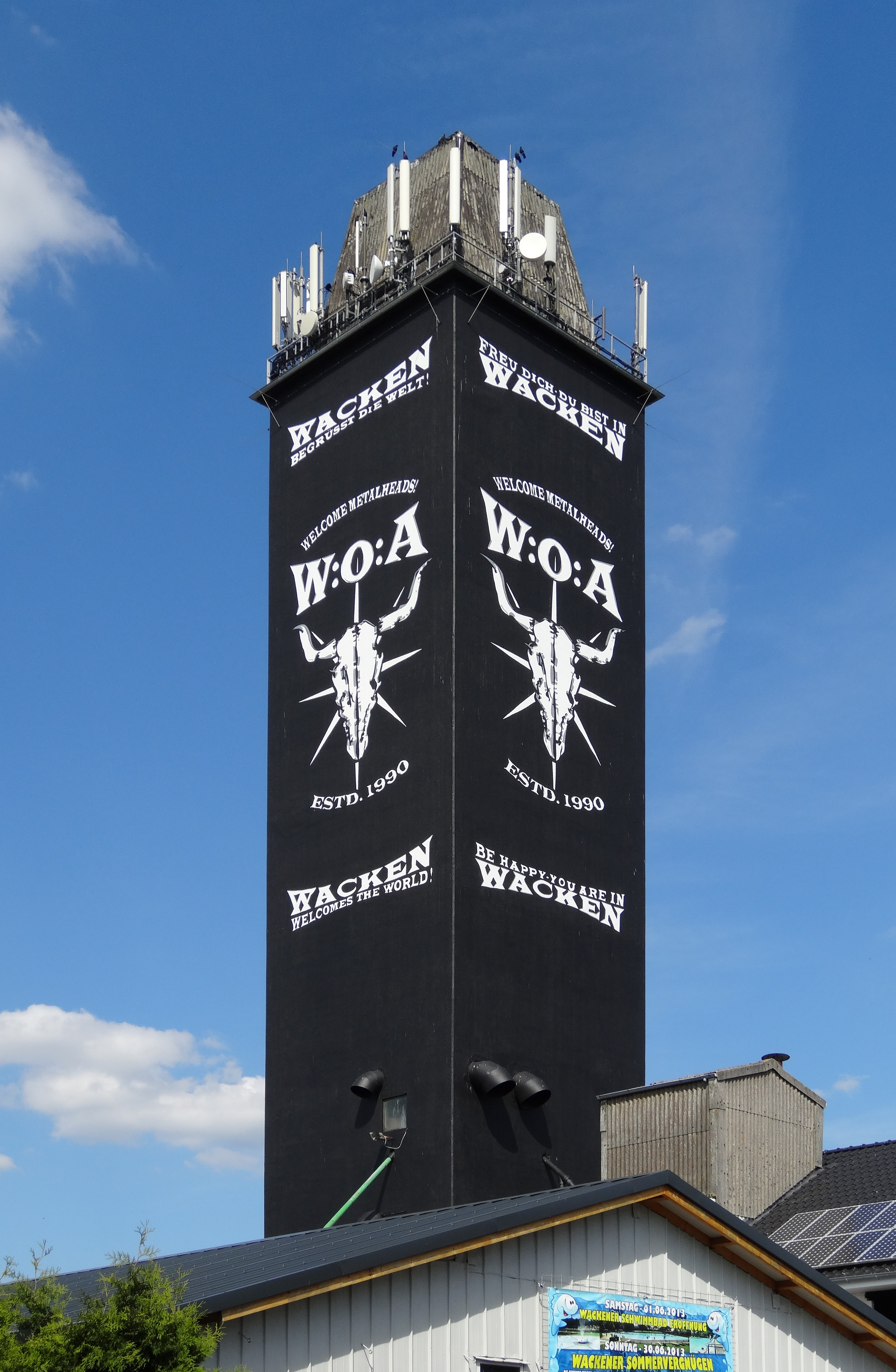 Ein Silo in Wacken, 2011 war er noch weiss gestrichen.